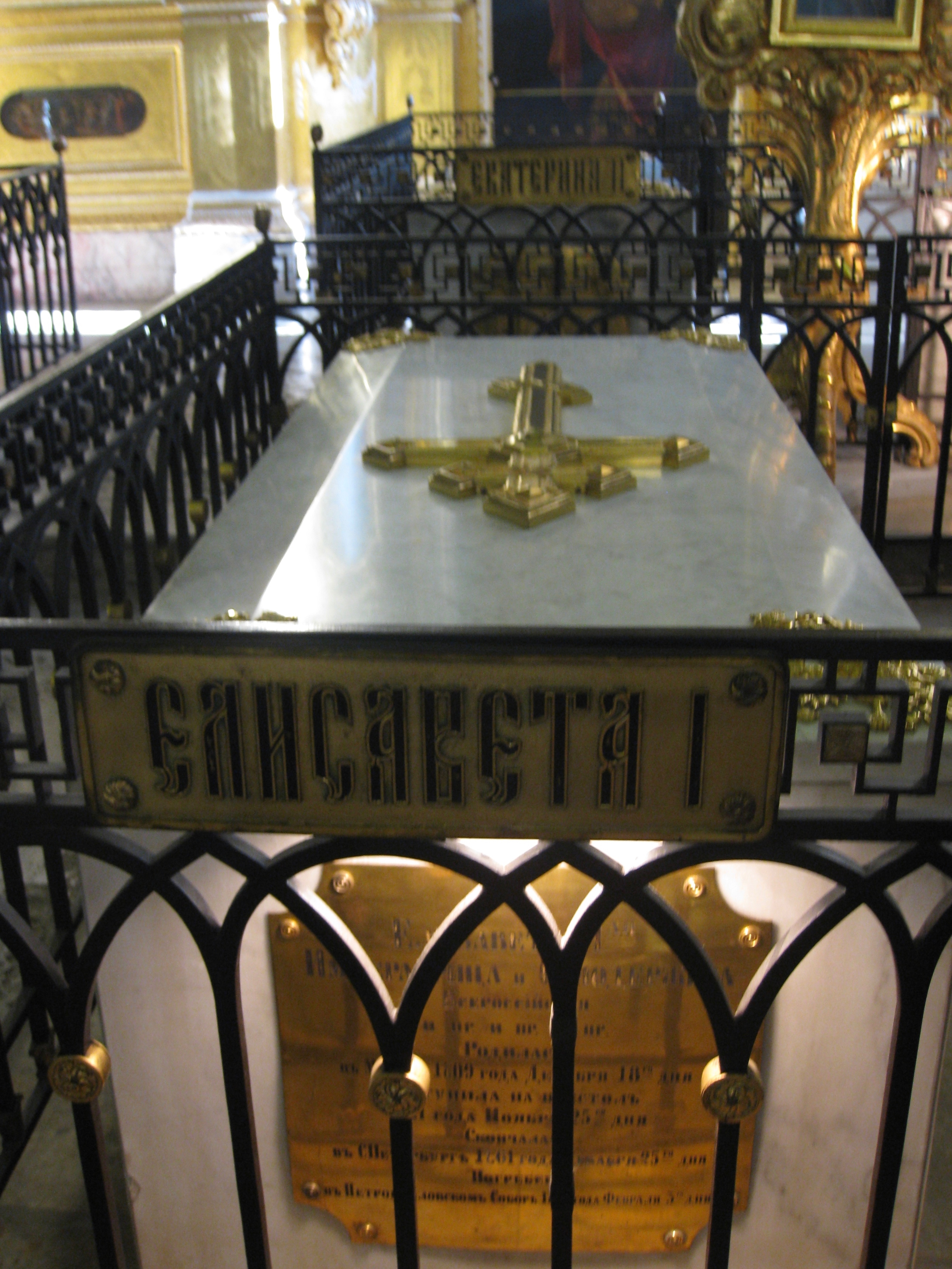 Saint Peter & Paul Cathedral קתדרלת פטרוס ופאולוס במצודת פטרוס ופאולוס סנקט פטרבורג בקתדרלה קבורים כל הצארים (למעט אחד) מאז פיוטר הגדול.